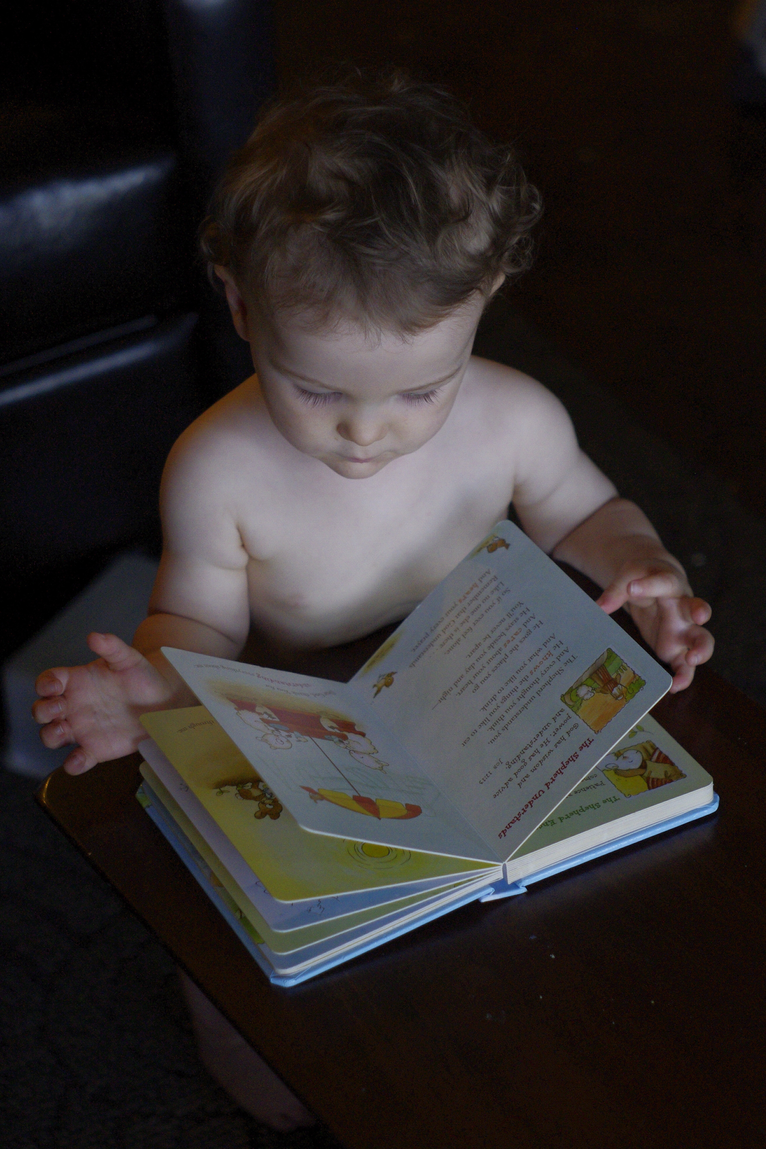 Reading 7